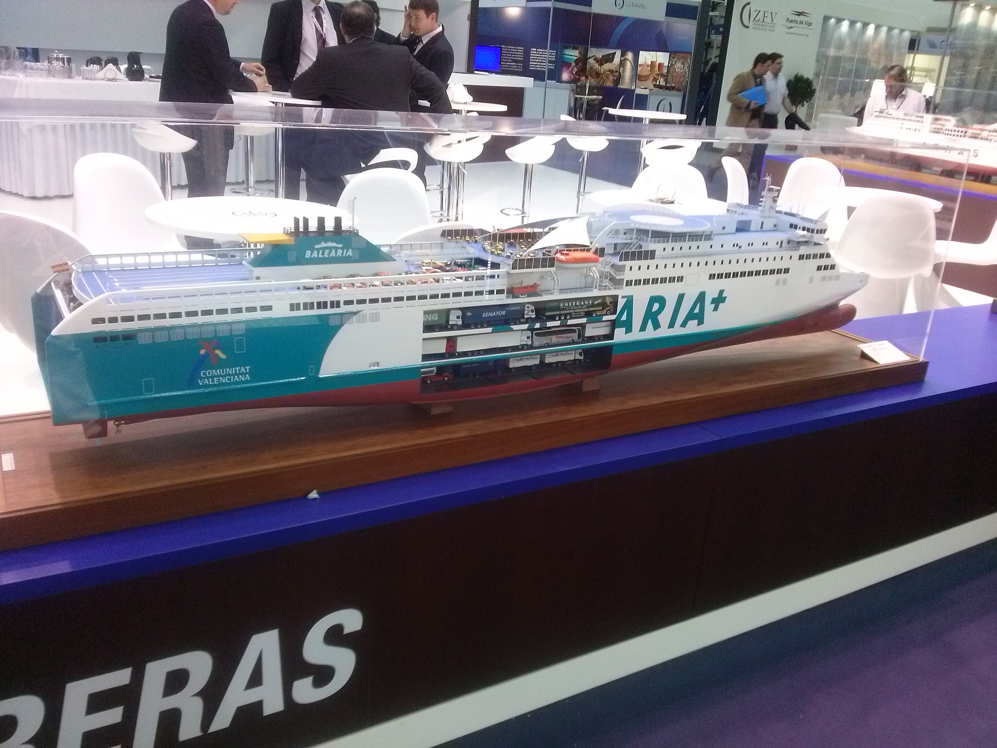 Maqueta en Navalia 2014 astillero Barreras Vigo